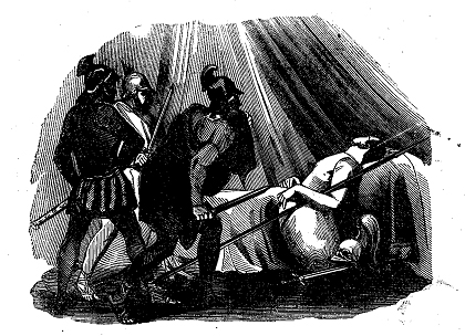 Muerte de Viriato, recogido en la publicación Museo de los niños.